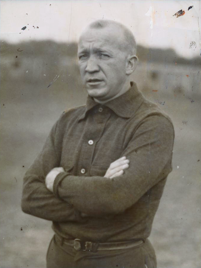 Knute Rockne